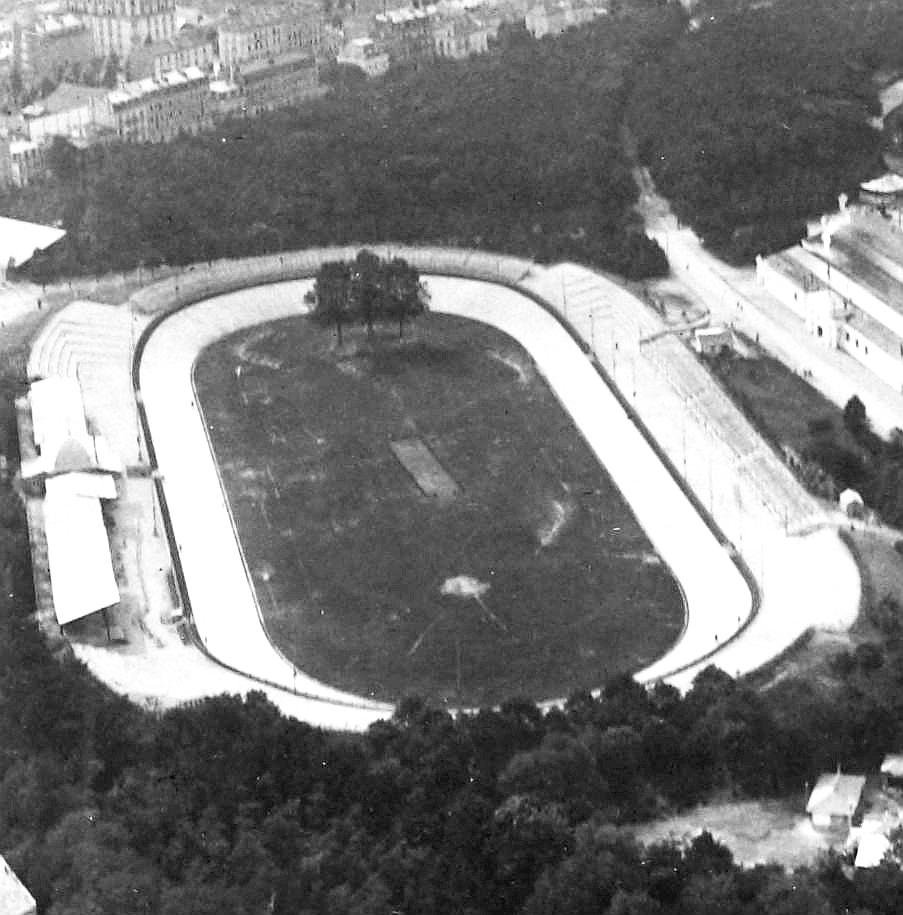 [Collection Jules Beau. Photographie sportive] : T. 12. Années 1899 et 1900 / Jules Beau : F. 5v. Vue de l Exposition de Vincennes, prise du ballon captif, 1900 ; concours hippique ; nouveau et ancien vélodromes